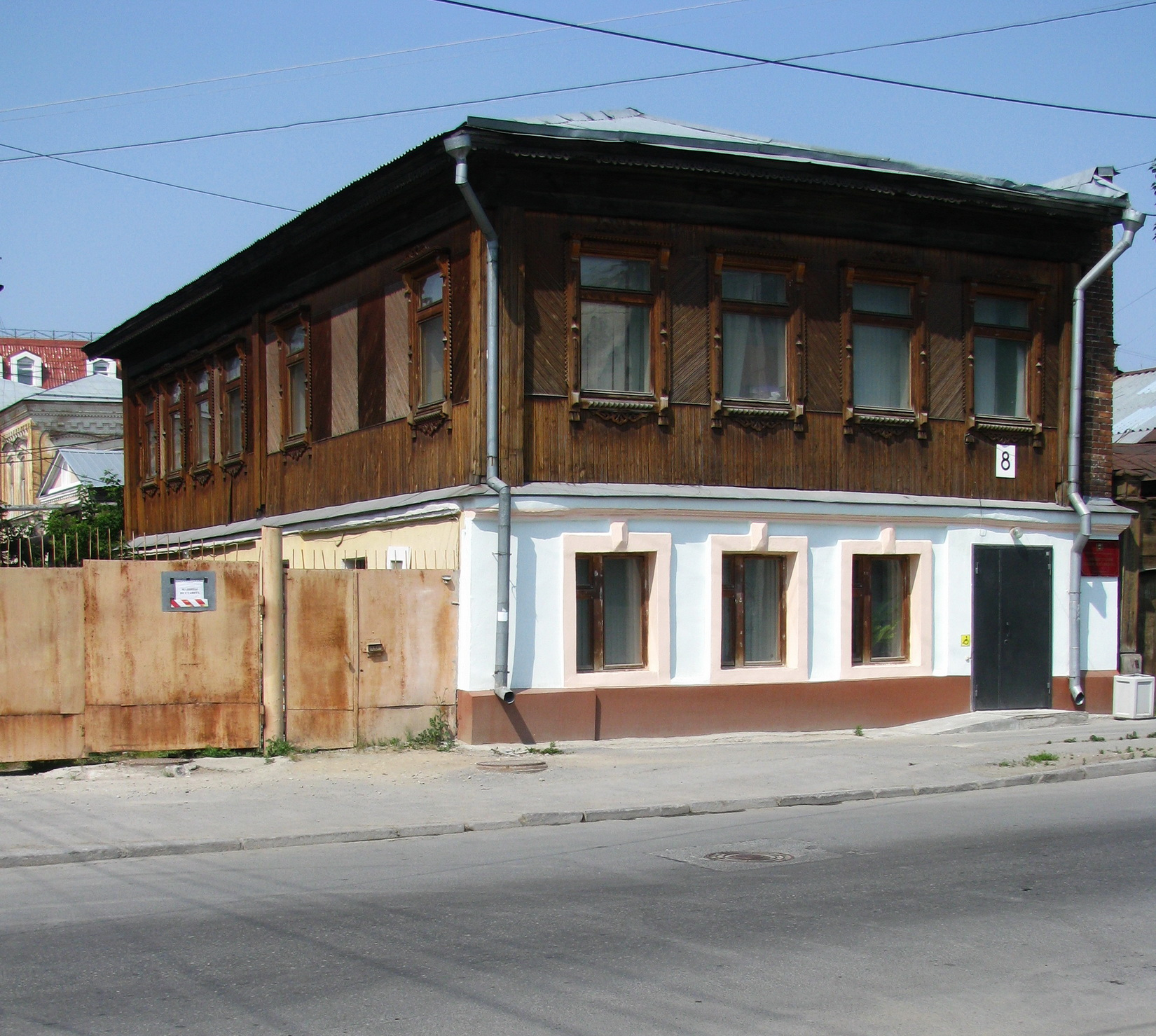 Полукаменный дом в Екатеринбурге постройки второй половины XIX века, в котором родился Эрнст Неизвестный.